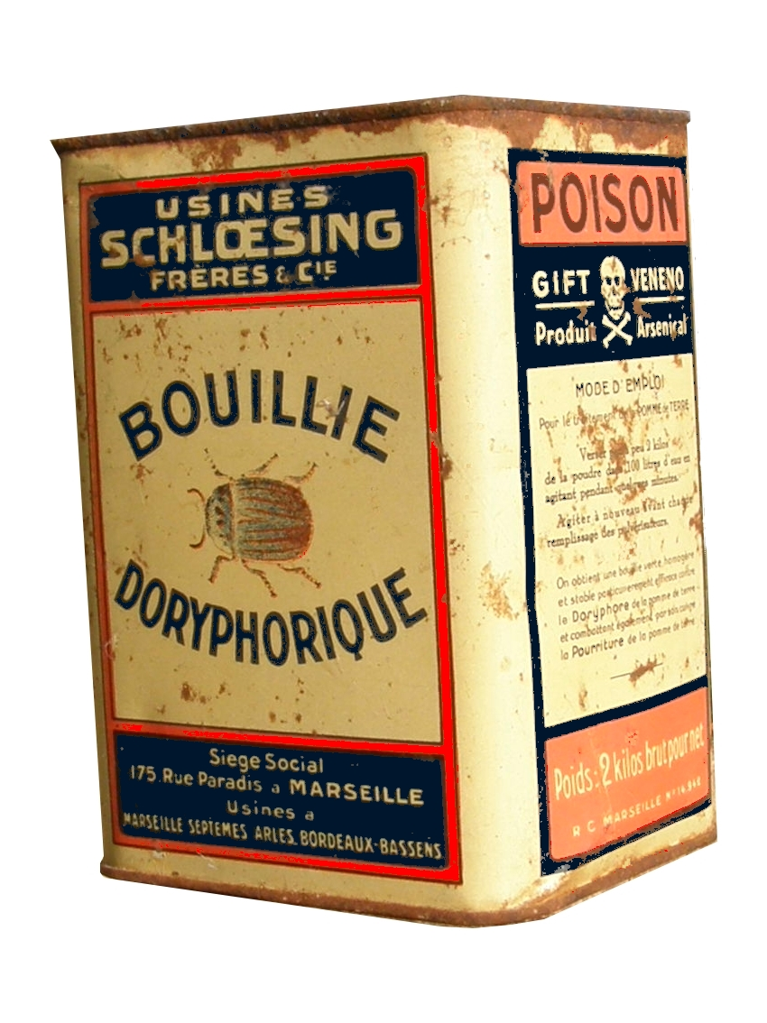 Ancienne boite de bouillie doryphorique à base de sels d'arsenic